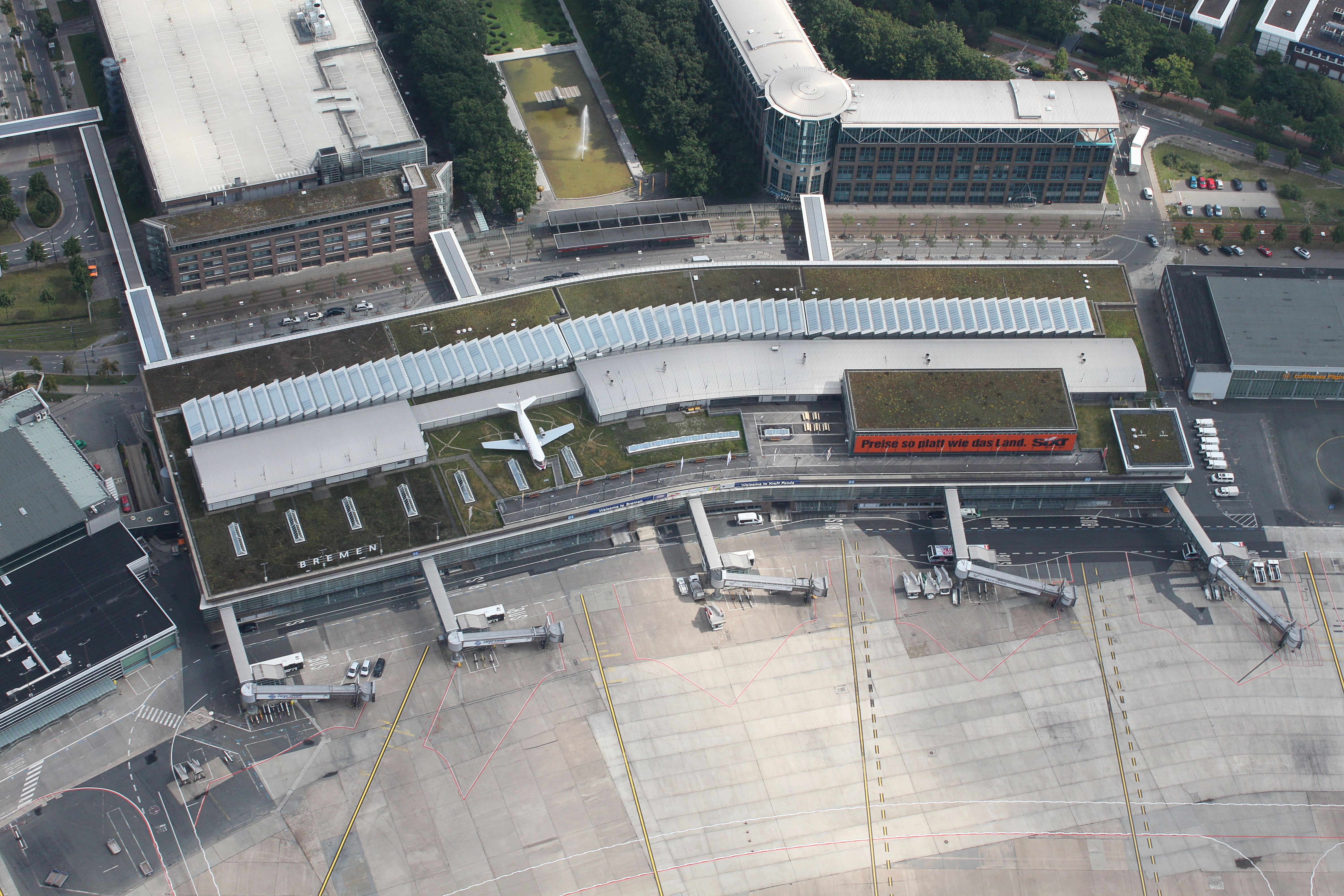 Flughafen Bremen; Bremen; Stadtteil: Neustadt Bremen; Ortsteil Neuenland; Airportstadt